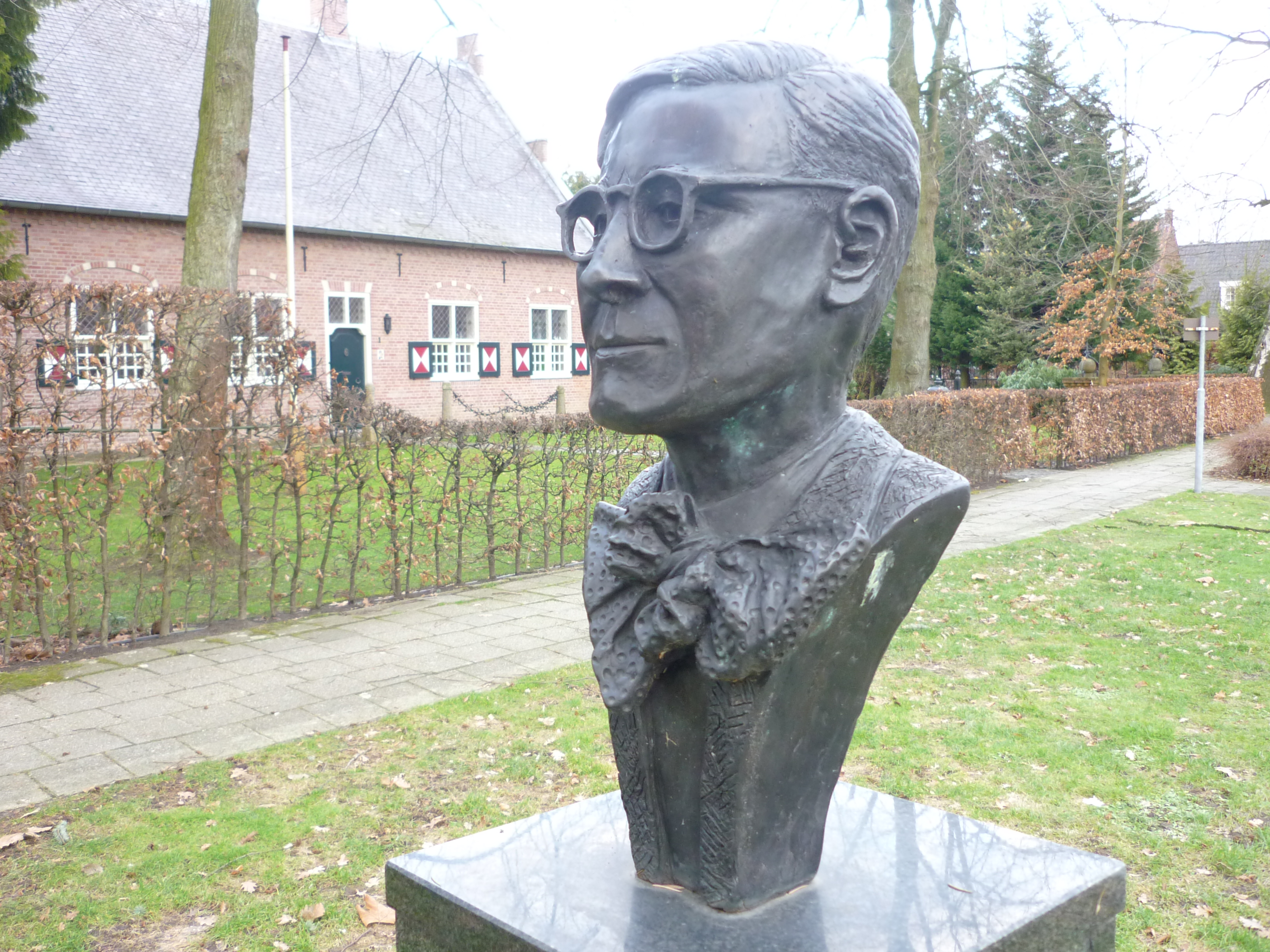 Borstbeeld van Antoon Coolen in de Romeinstraat, op de achtergrond gedeelte van huize De Romein, waarin Antoon Coolen enkele jaren woonde.